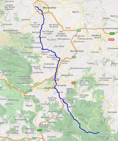 carte réalisée sur umap This map may be incomplete, and may contain errors. Don't rely solely on it for navigation.